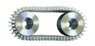 Riemenbürsten eignen sich sehr gut zum Reinigen von Oberflächen unterschiedlichster Materialien. Ausserdem lassen sich empfindliche Werkstücke schonend damit transportieren.